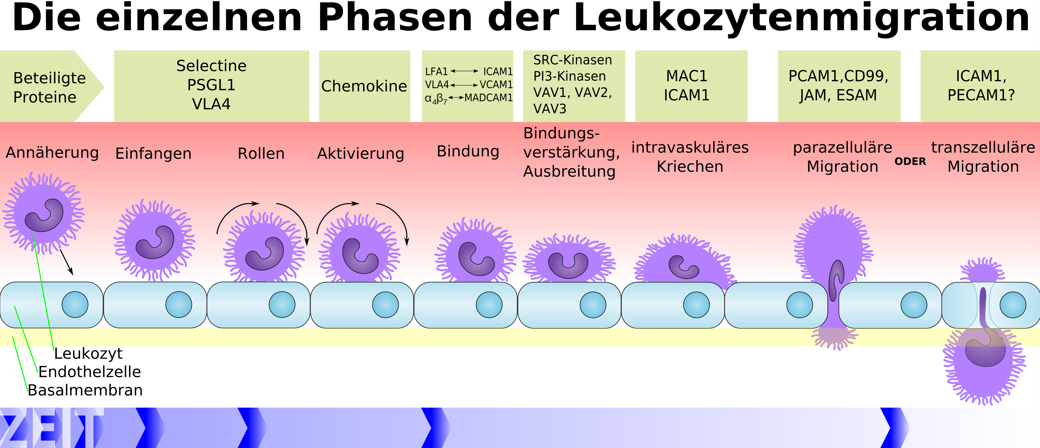 Schematische Darstellung der Leukozytenmigration durch das Endothel. Nach einer Grafik von U. H. von Andrian und C. R. Mackay: T-Cell Function and Migration. In: NEJM. October 5th, 2000, S. 1025. Und K. Ley et al.: Getting to the site of inflammation: the leukocyte adhesion cascade updated. In: Nature Reviews Immunology 7, 2007, S. 679